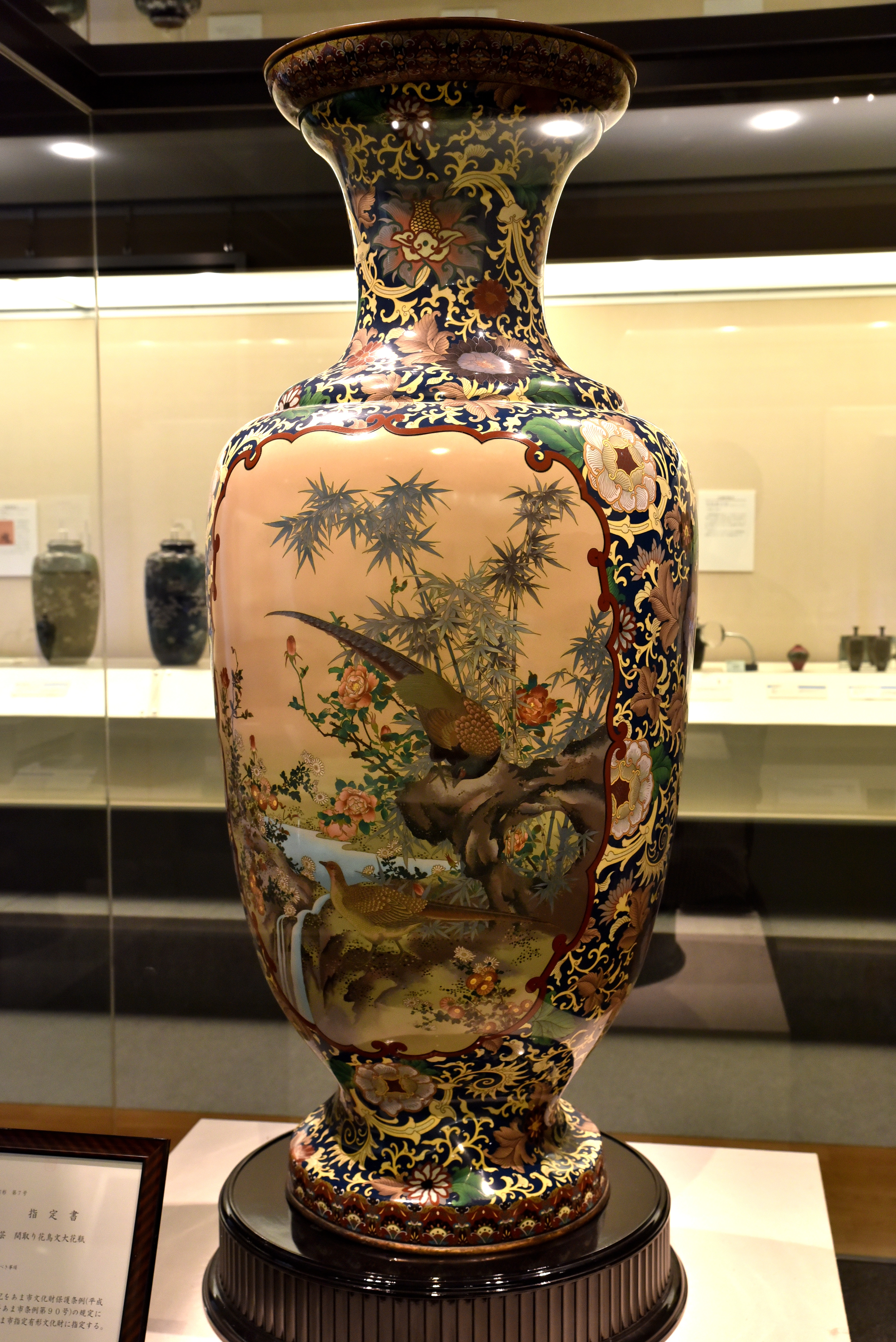 尾張七宝（撮影・公衆送信許諾あり） Nikon D750